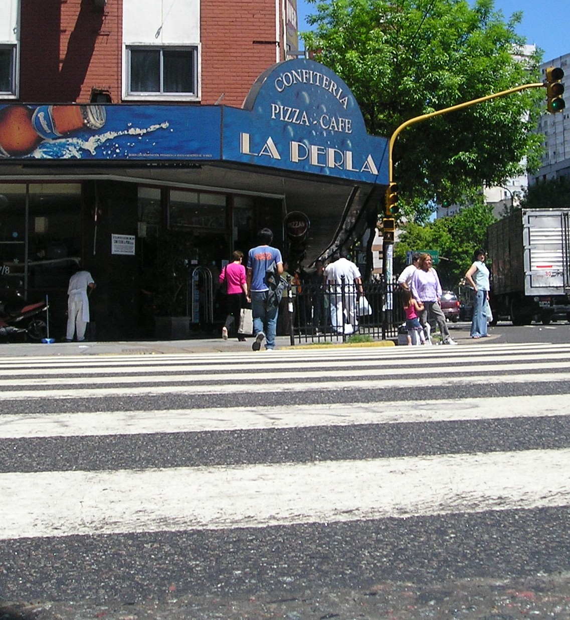 La Perla del Once. Esquina de las avenidas Rivadavia y Jujuy (barrio Once). Buenos Aires. Lugar donde se compuso La Balsa (Litto Nebbia y Tanguito).